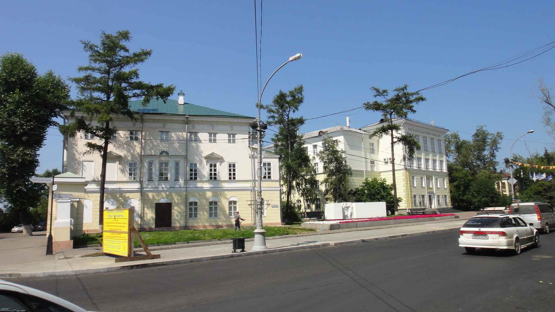 Иркутский государственный университет